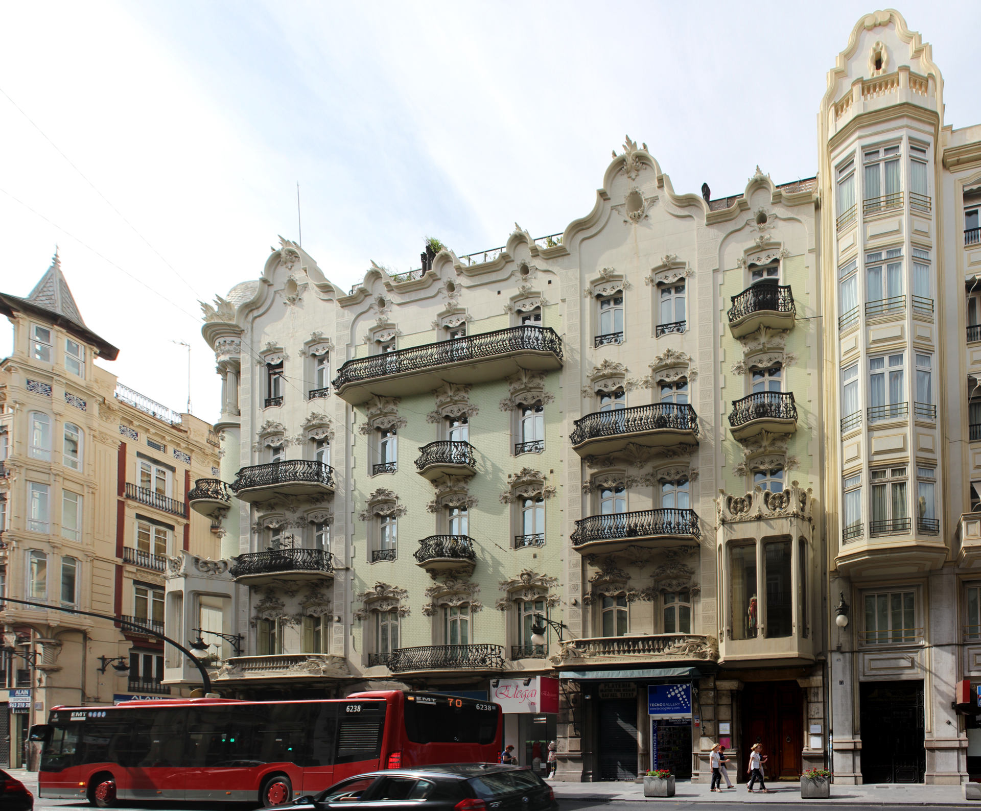 El edificio Gómez es un edificio de viviendas de la ciudad de Valencia (España), sito en calle La Paz n.º 21 y construido en uno de los cruces más importantes de la calle de la Paz, sobre un solar sumamente irregular, presentando dos fachadas que definen la esquina y una tercera a la calle posterior. Se trata de un edificio residencial plurifamiliar de estilo modernista construido en el año 1905, obra de los arquitectos Francisco Mora Berenguer, Antonio Martorell Trilles y Enric Sagnier Villavechia.